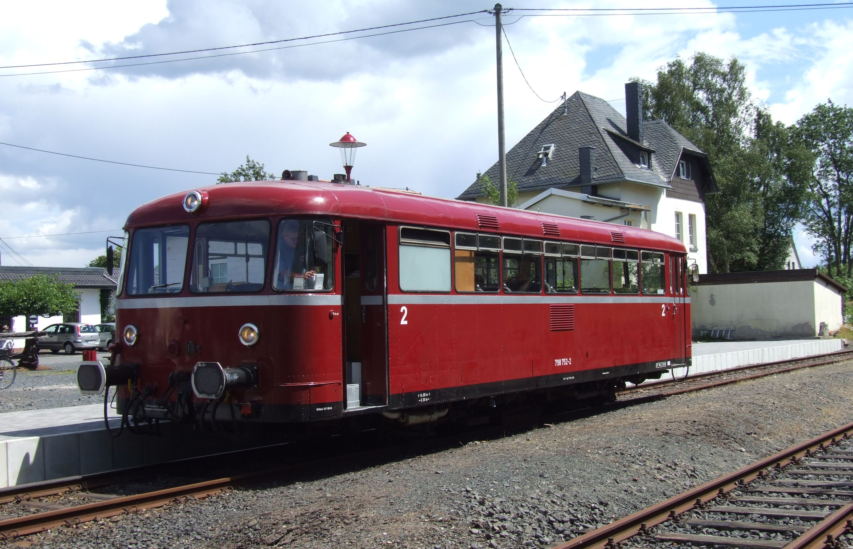 Schienenbus 798 752-2 der Kasbachtalbahn in Kalenborn vor dem Bahnhofsgebäude